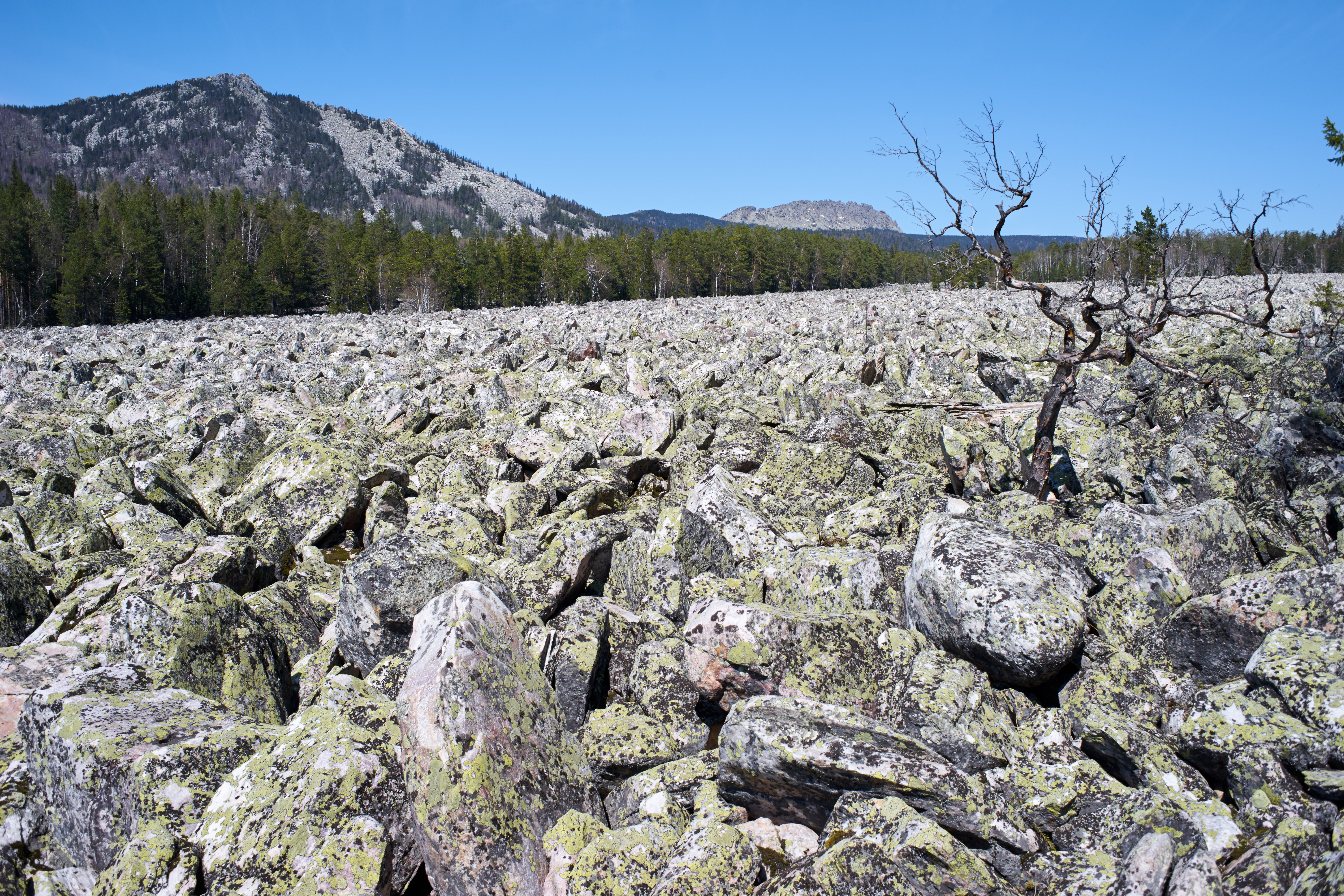 Национальный парк Таганай: Парк расположен в северной части Златоустовского и Кусинского районов Челябинской области. К южным границам парка примыкает участок Южно-Уральской железной дороги и автодорога Златоуст – Миасс. Территория национального парка включает в себя северную часть средне-высотных хребтов Южного Урала, представляющих собой обособленный горный узел, с трех сторон переходящий в плоскогорья и далее – в лесостепь. Протяженность территории национального парка с юга на север – 52 км, с запада на восток 10-15 км,Златоуст, Челябинская область This image is related to the protected area of Russia number 7400102